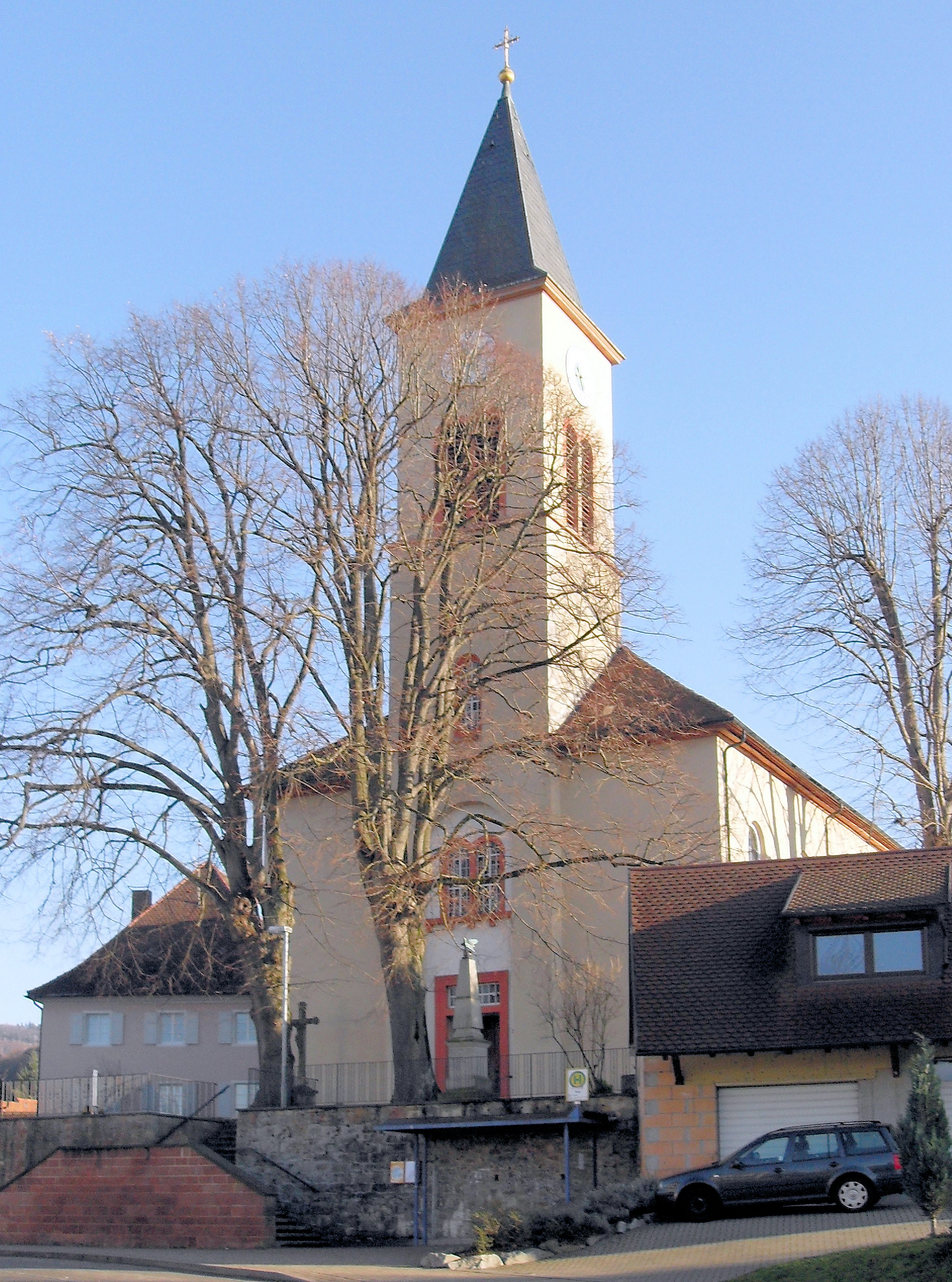 Nordwestseite der Kirche St. Hilarius in Bollschweil